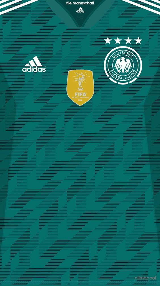 Camiseta Alternativa De La Seleccion De Alemania 2018 Con El Escudo Del Campeon Del Mundial De Brasil 2014